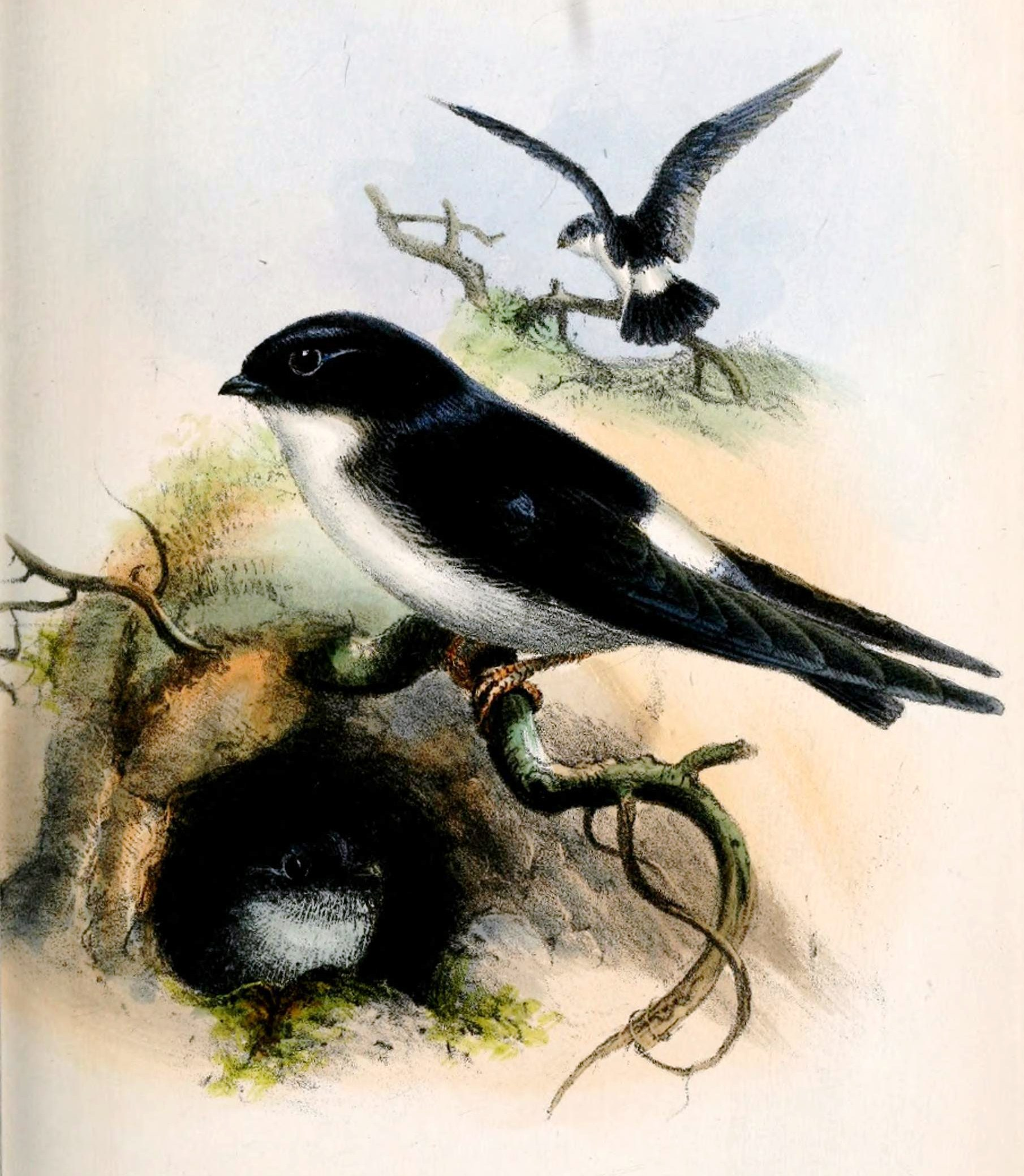 Delichon nipalense